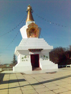 Kőrösi Csoma Sándorról elnevezett sztúpa Tar községnél, Nógrád megye